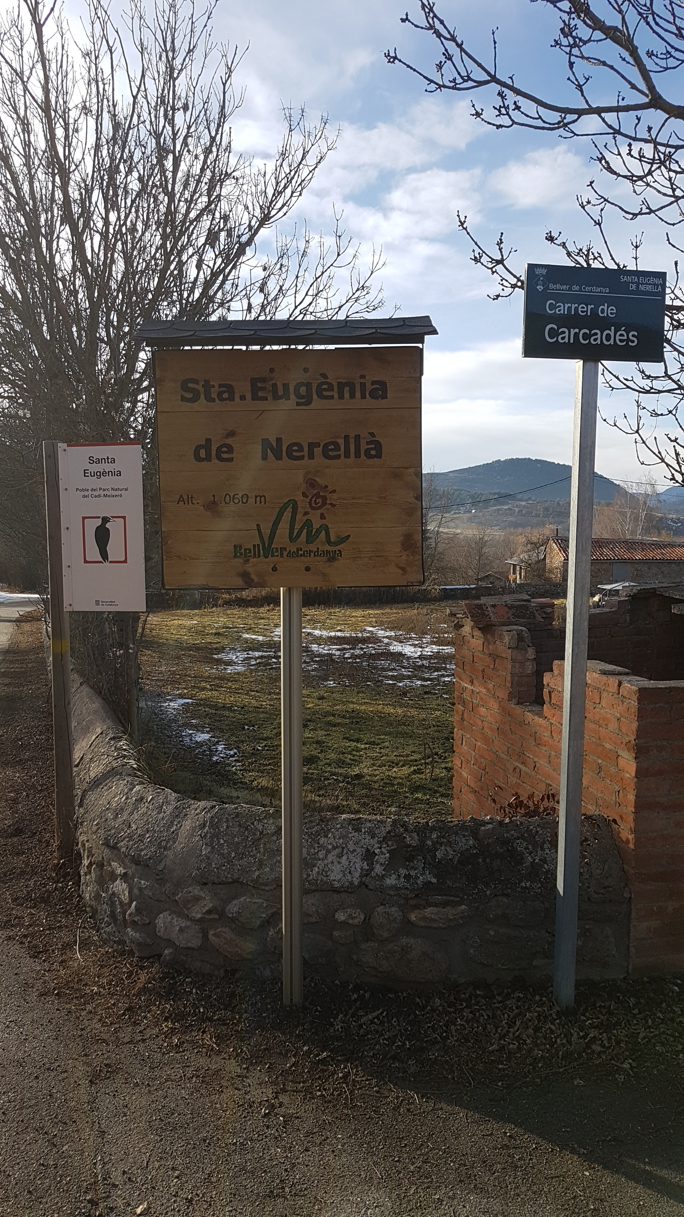 Rétol de Santa Eugènia de Nerellà